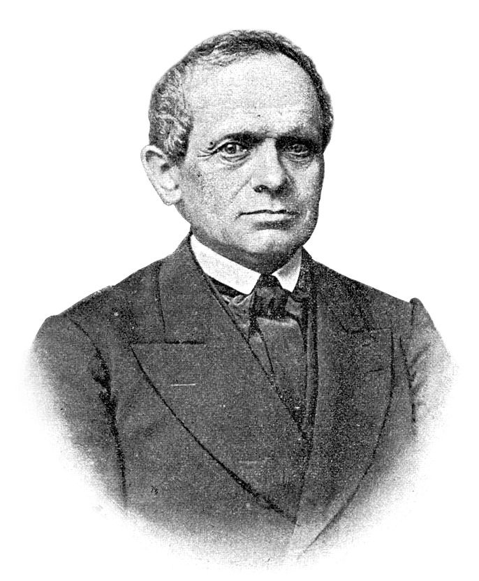 Отець Стефан Качала